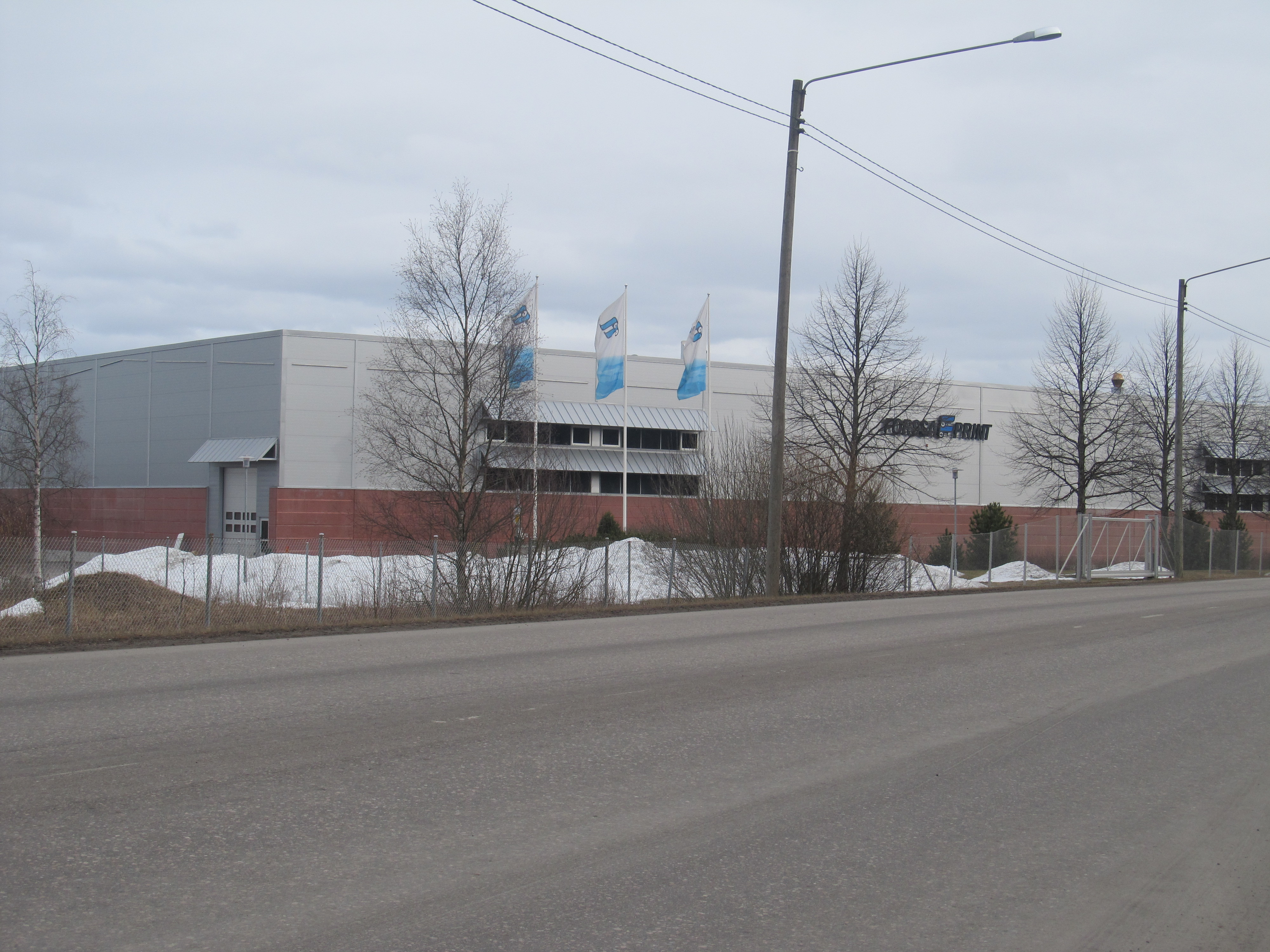 Forssa Printin sanomalehtipaino Forssassa